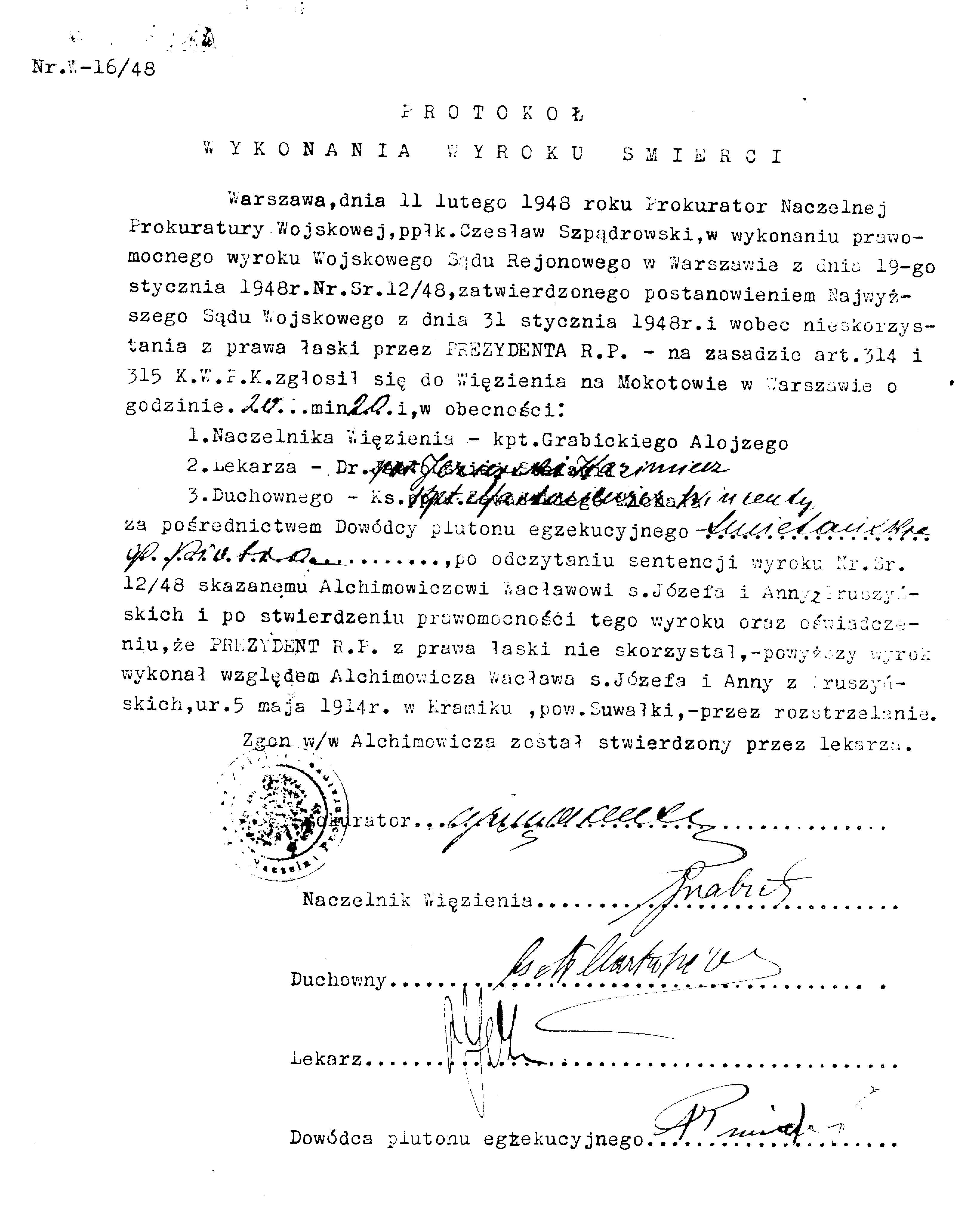 Protokół wykonania wyroku śmierci na Wacławie Alchimowiczu dnia 11.02.1948r.